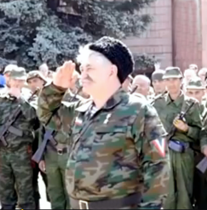 Mykola Iwanowytsch Kosizyn, ist ein ukrainischer Geschäftsmann und Rebellenkommandant.